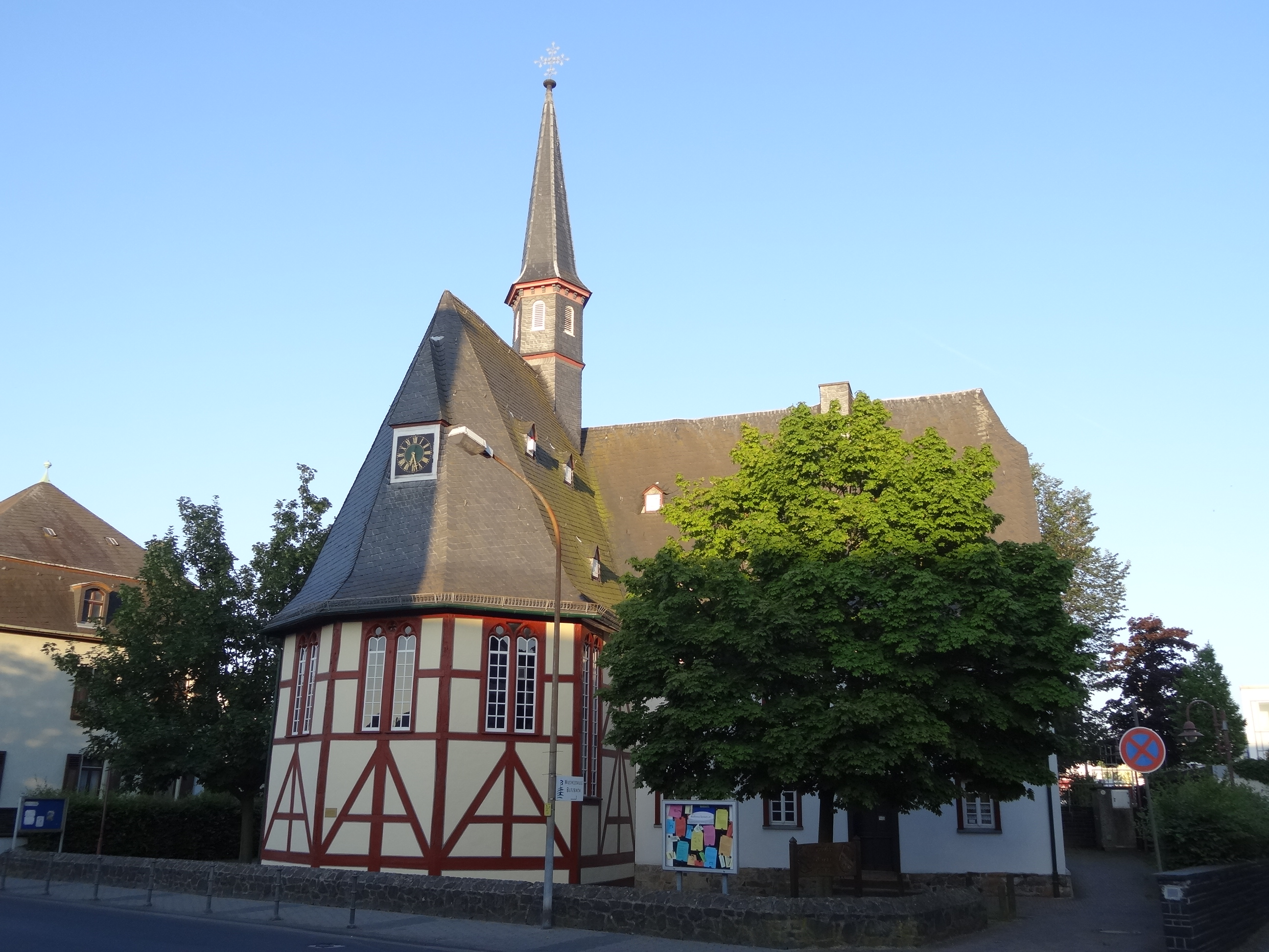 Ehemalige Hospitalkapelle St. Wendelin (Butzbach)